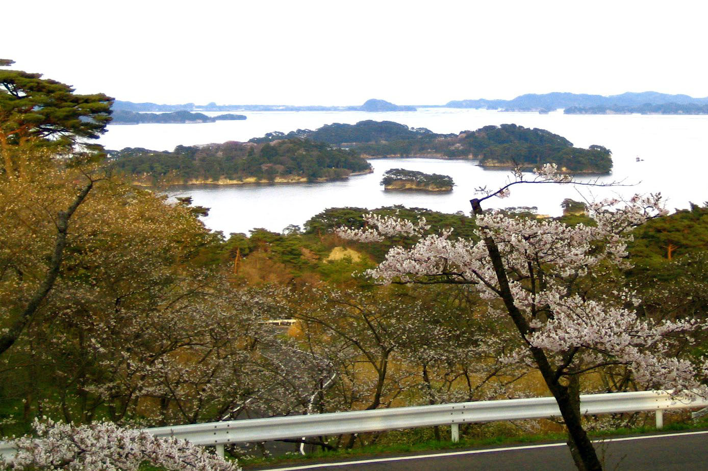 Saigyomodoshigamatsu Park